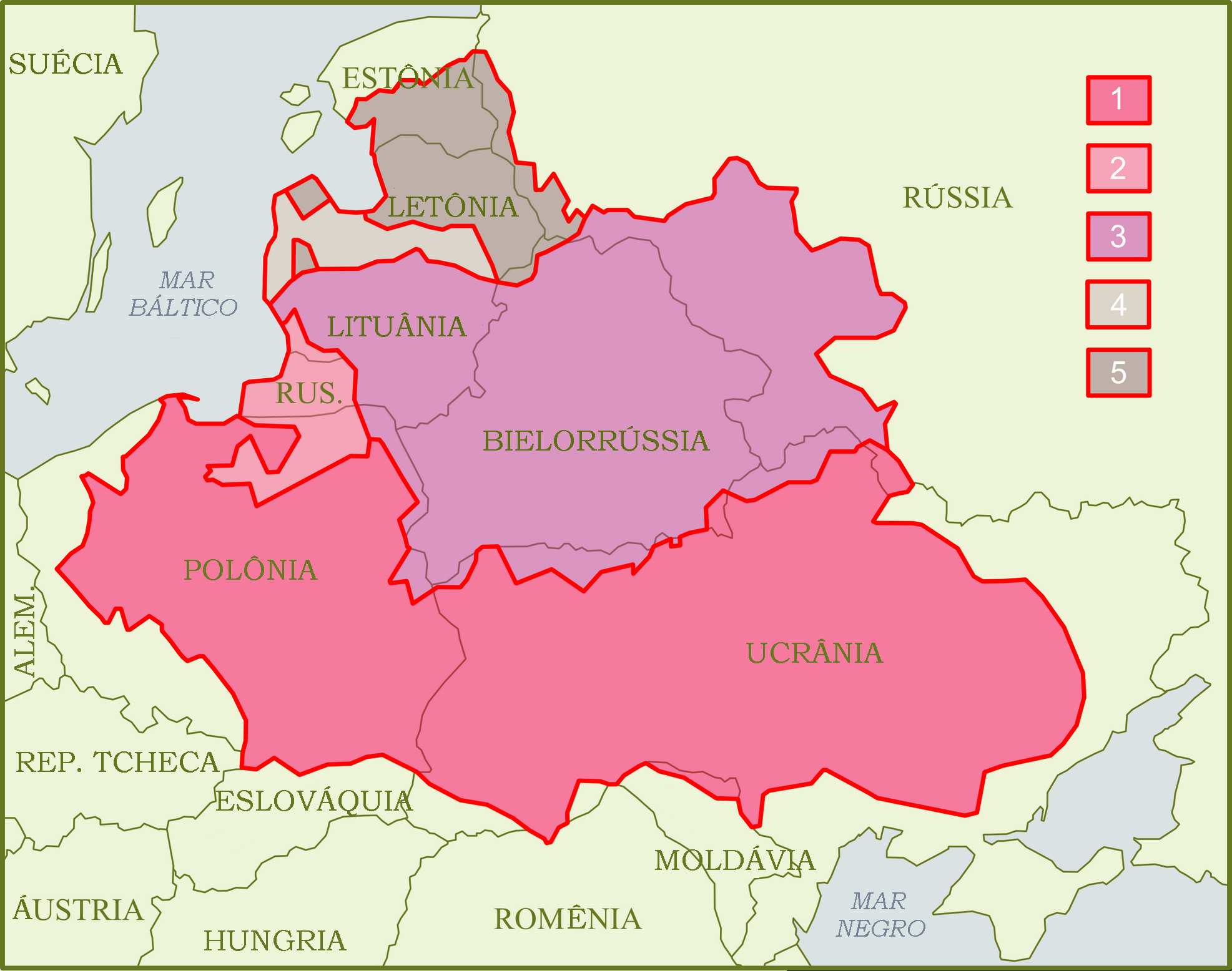 República Das Duas Nações (1619) LEGENDA: 1 - A Coroa (Reino da Polônia), 2 - Ducado da Prússia - feudo polonês, 3 - Grão-Ducado da Lituânia, 4 - Ducado da Curlândia - feudo livoniano, 5 - Livônia.